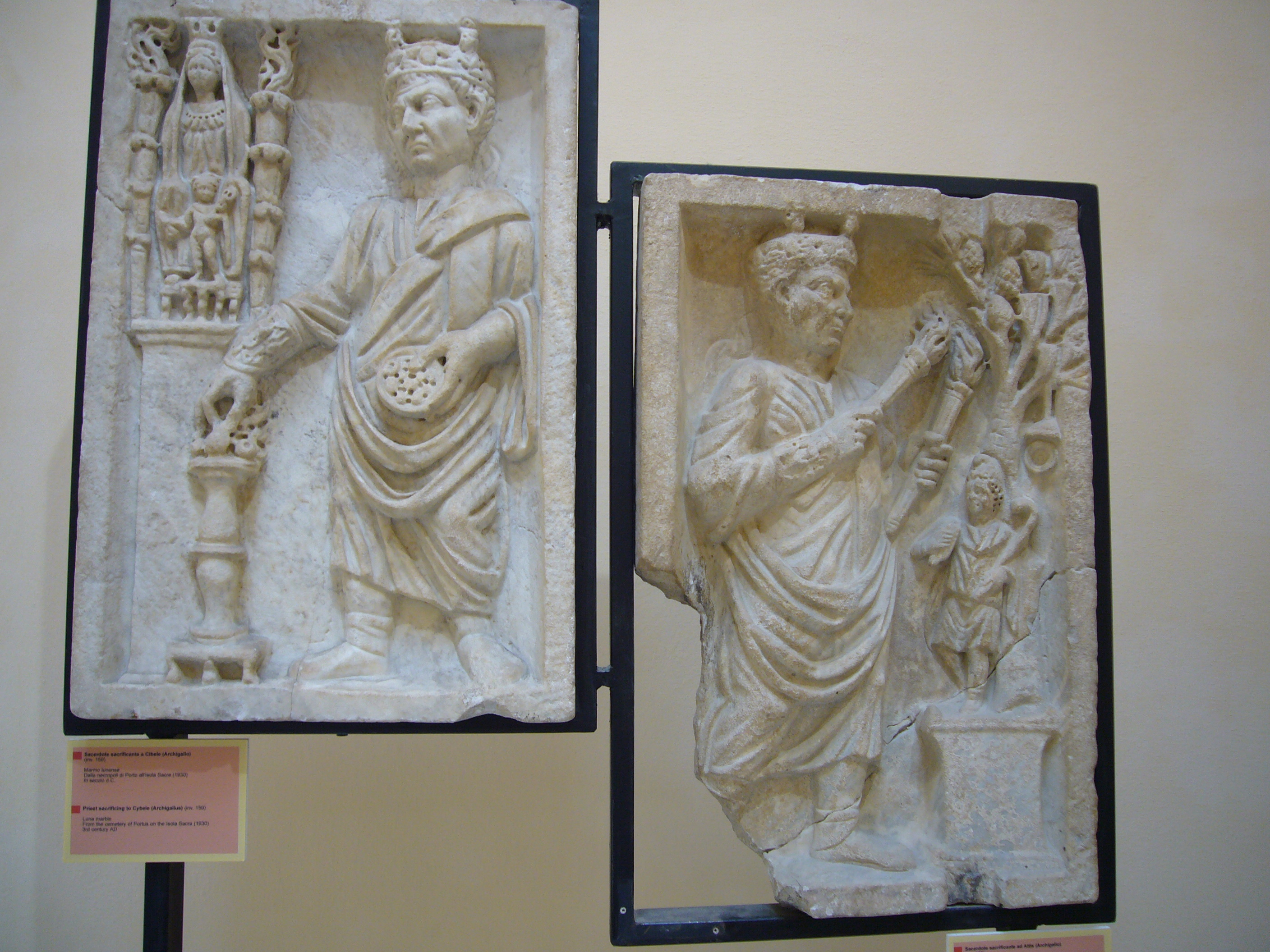 Ostia Antica, Museo Ostiense: sacerdote che sacrifica a Cibele (archigallus)